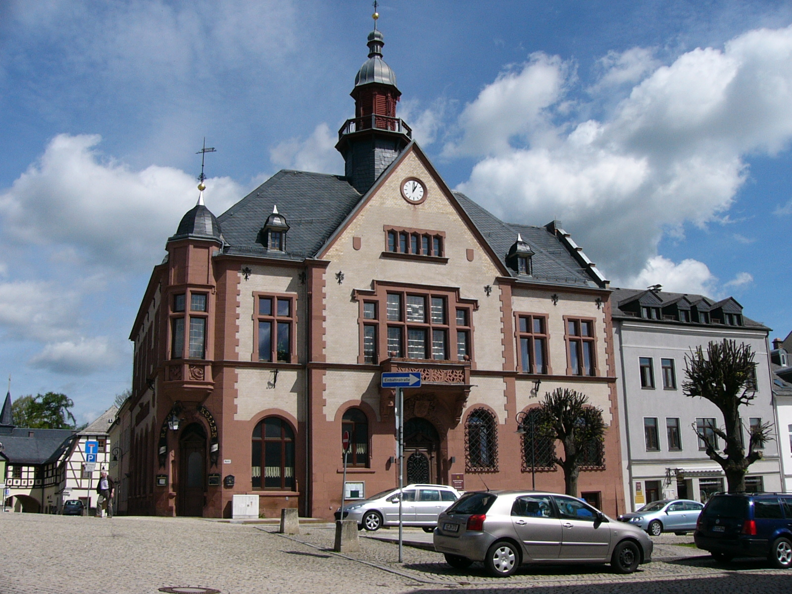 Adorf, Rathaus